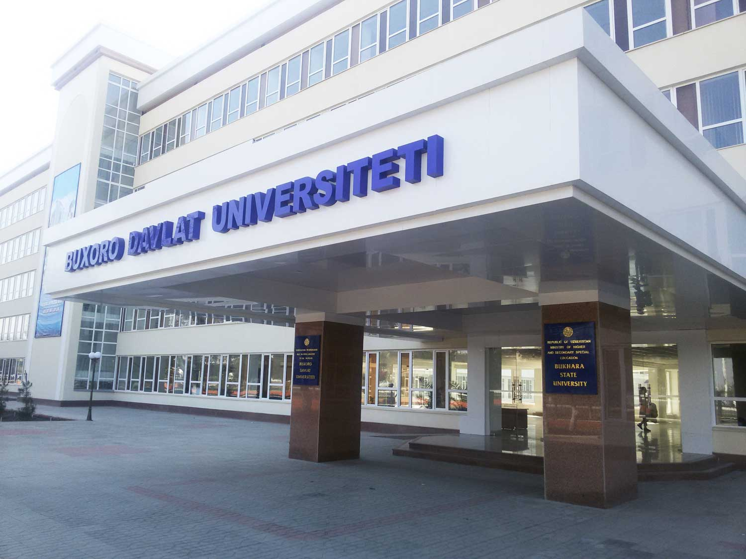 Oʻzbekcha/ўзбекча: Buxoro davlat universiteti